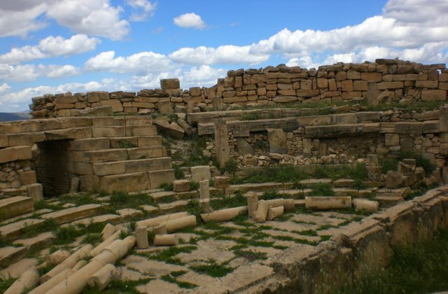 Ruines du site antique Madaure (Madaura, Madaurius, M'daourouch)